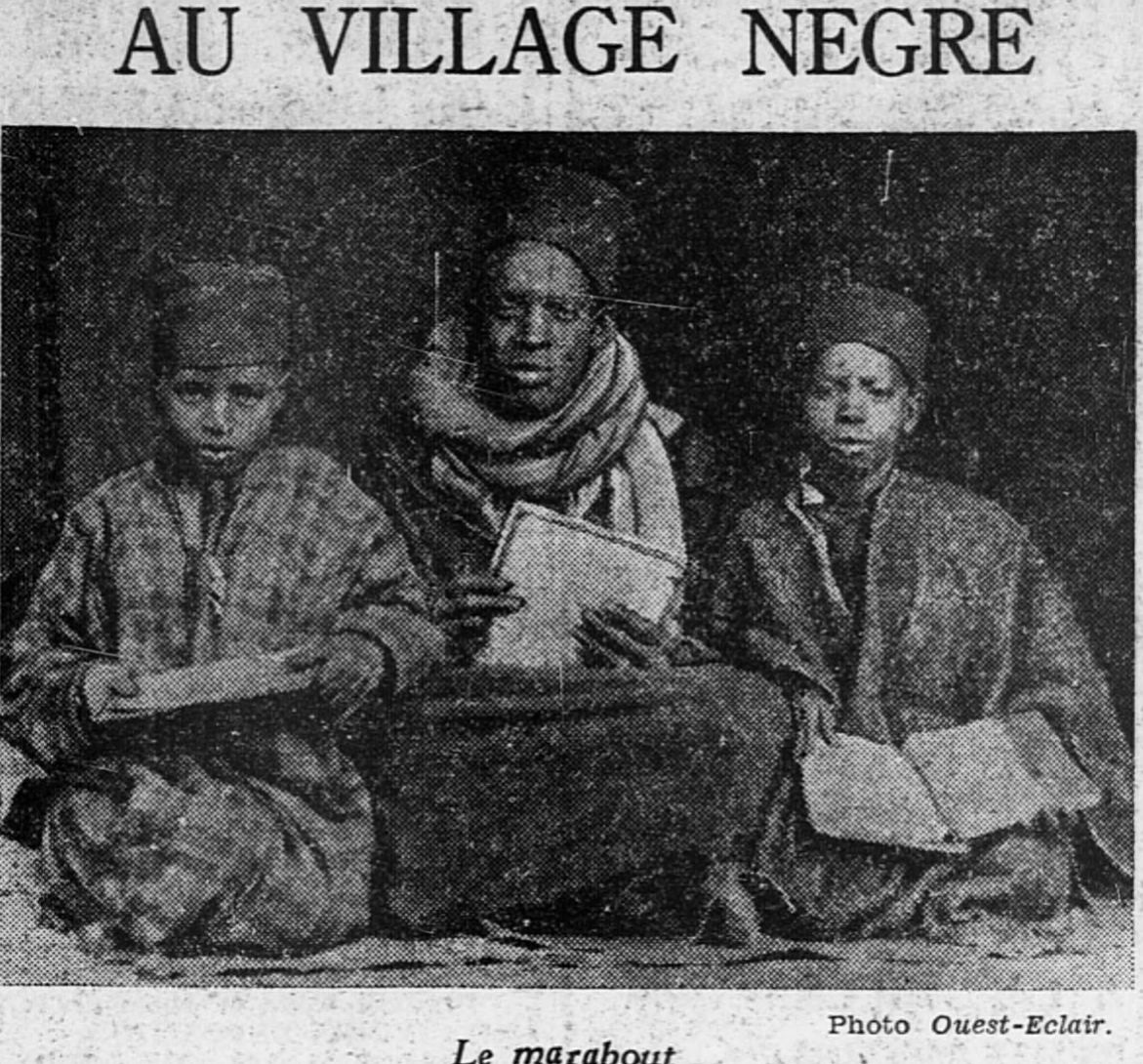 Zoo humain organisé à Rennes en mai 1929, et couert par le journal Ouest-Eclair.